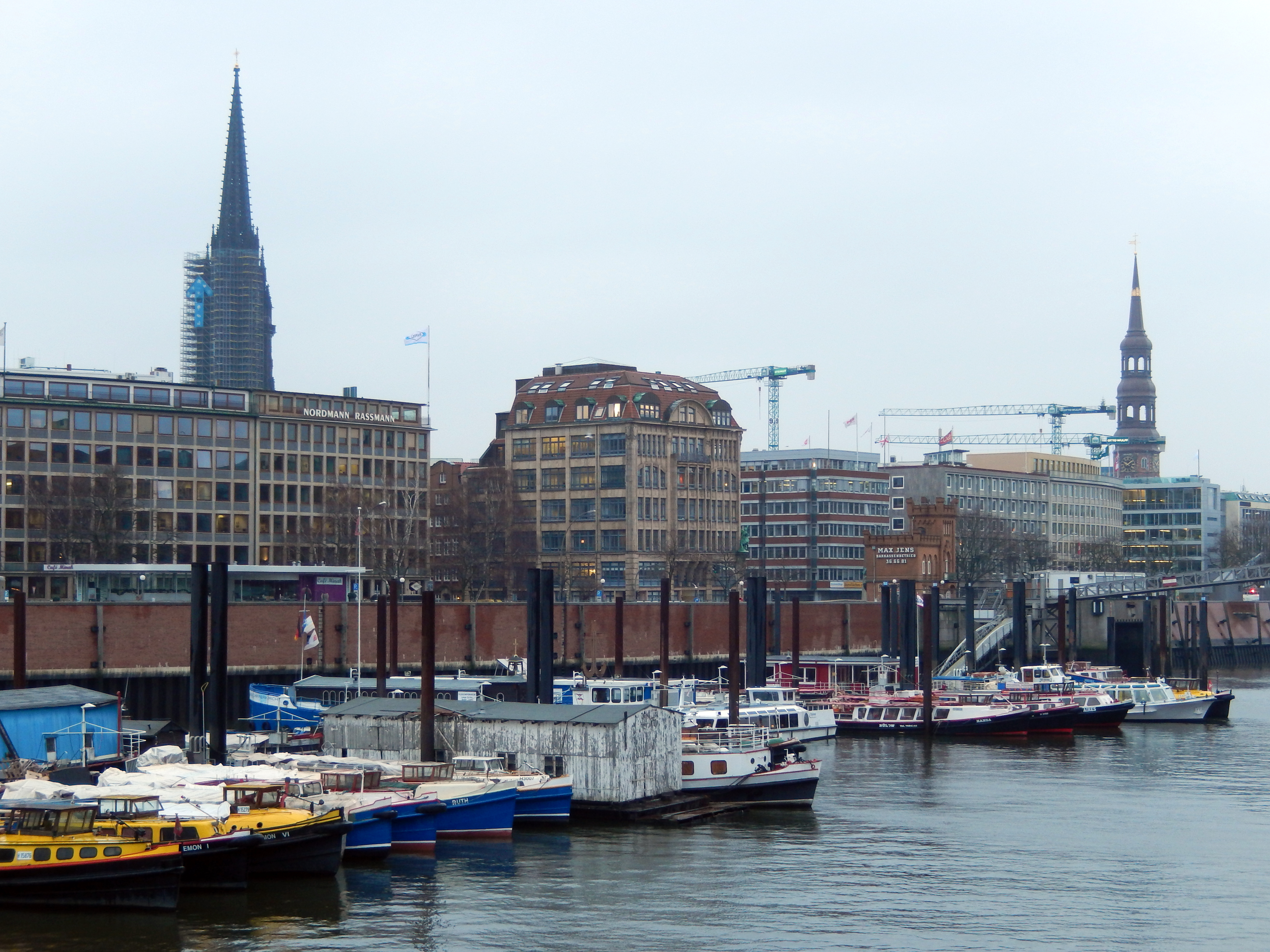 Binnenhafen